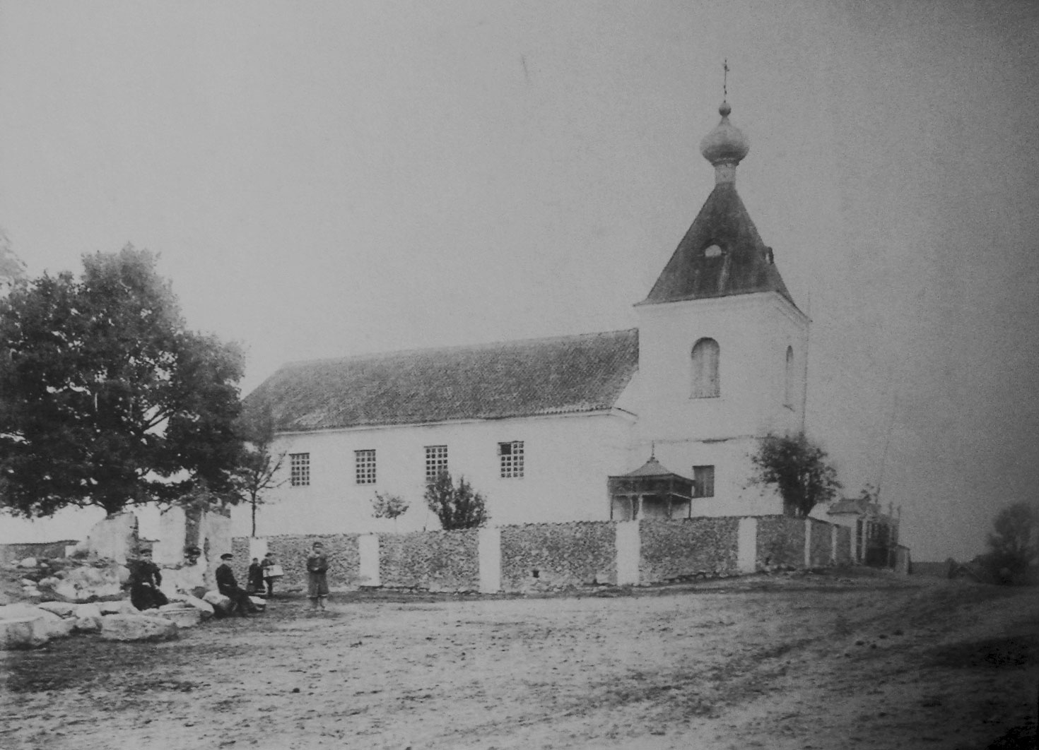 Беларуская (тарашкевіца): Зэльва (Zelva), вуліца Царкоўная (vulica Carkoŭnaja). Касьцёл па маскоўскай перабудове